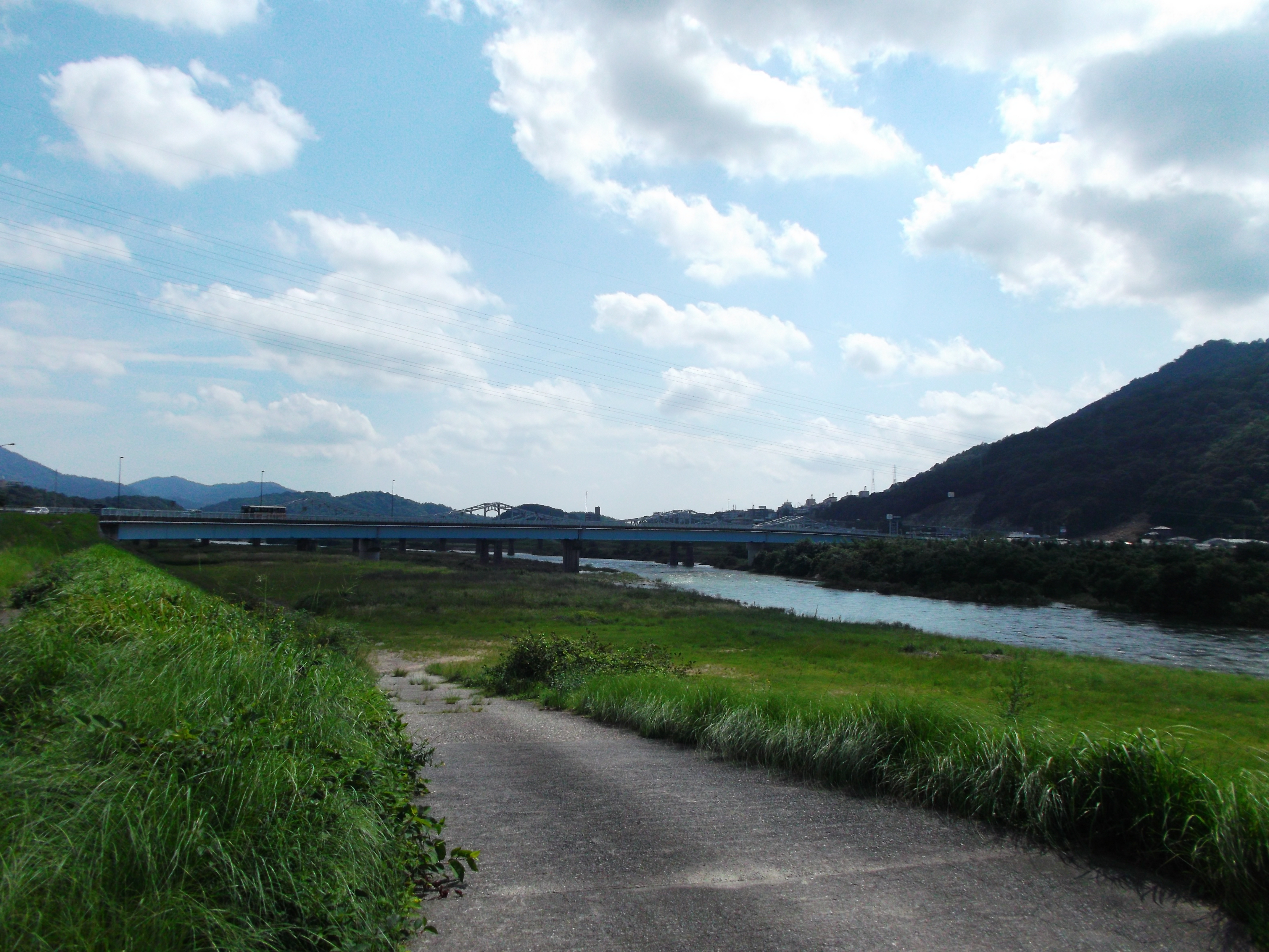 新太田川橋。右奥の安佐南区八木地区の土砂崩れは2014年8月豪雨災害によるもの。